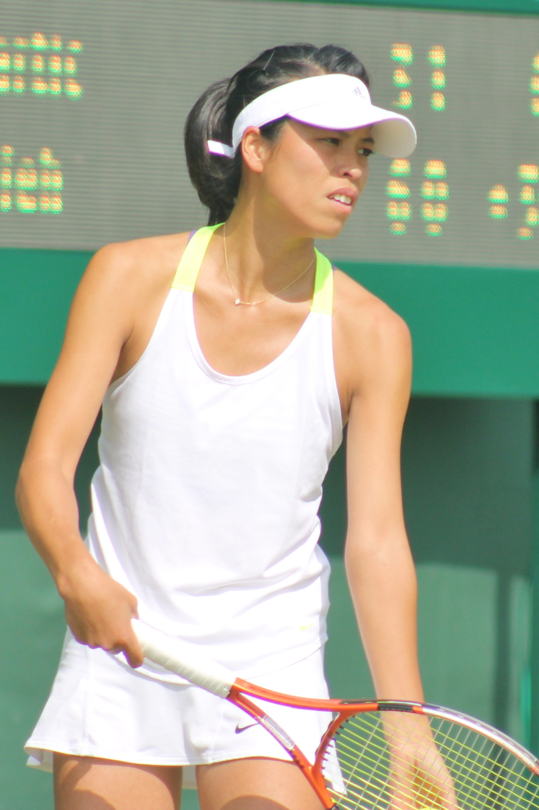 Hsieh WMQ15 (5)